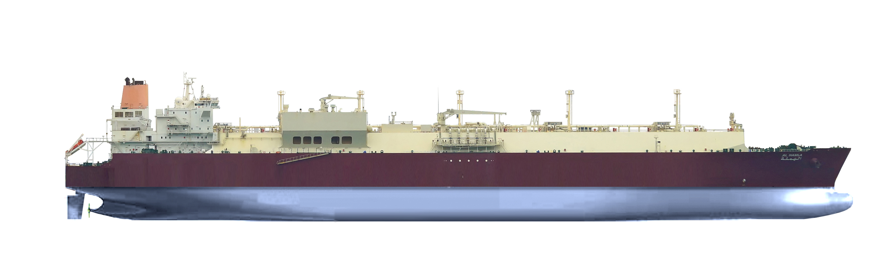 LNG carrier Al Hamla. В качестве основы использована фотография